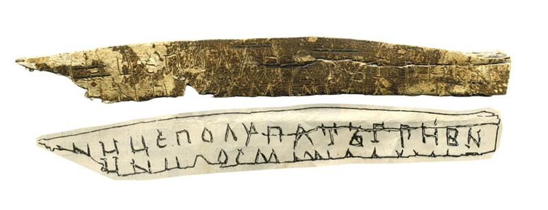 Мсціслаўская берасцяная грамата